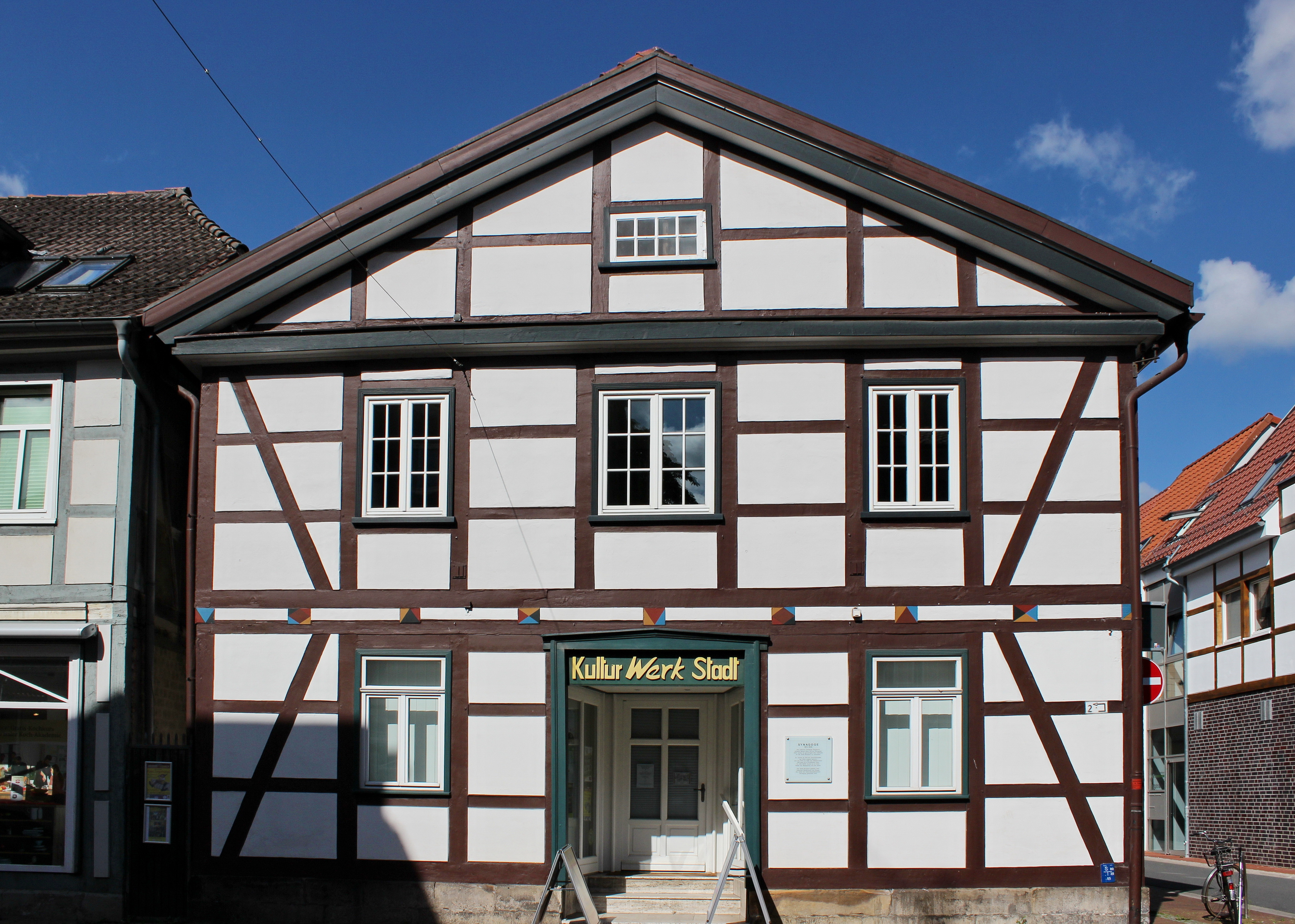 Die ehemalige Synagoge steht an der Poststraße 2 in Burgdorf (Region Hannover). Neben der Haustür ist eine Informationstafel angebrachtː "Synagoge (1811-1939) Die jüdische Gemeinde Burgdorfs erbaute dieses Haus 1811 als Synagoge. 1939 wurde sie gezwungen, das Gebäude an die Stadt Burgdorf zu verkaufen. Es wurde ab 1941 als Geschäftsstelle der Hitler-Jugend genutzt und von 1944 bis 1959 als Volksbücherei. 1961 ging es in Privatbesitz über. Im Jahr 2008 wurde es zu einer Stätte der Begegnung und der Kultur. Die Stadt Burgdorf gedenkt ihrer jüdischen Bürgerinnen und Bürger, die Opfer der nationalsozialistischen Verfolgung geworden sind."